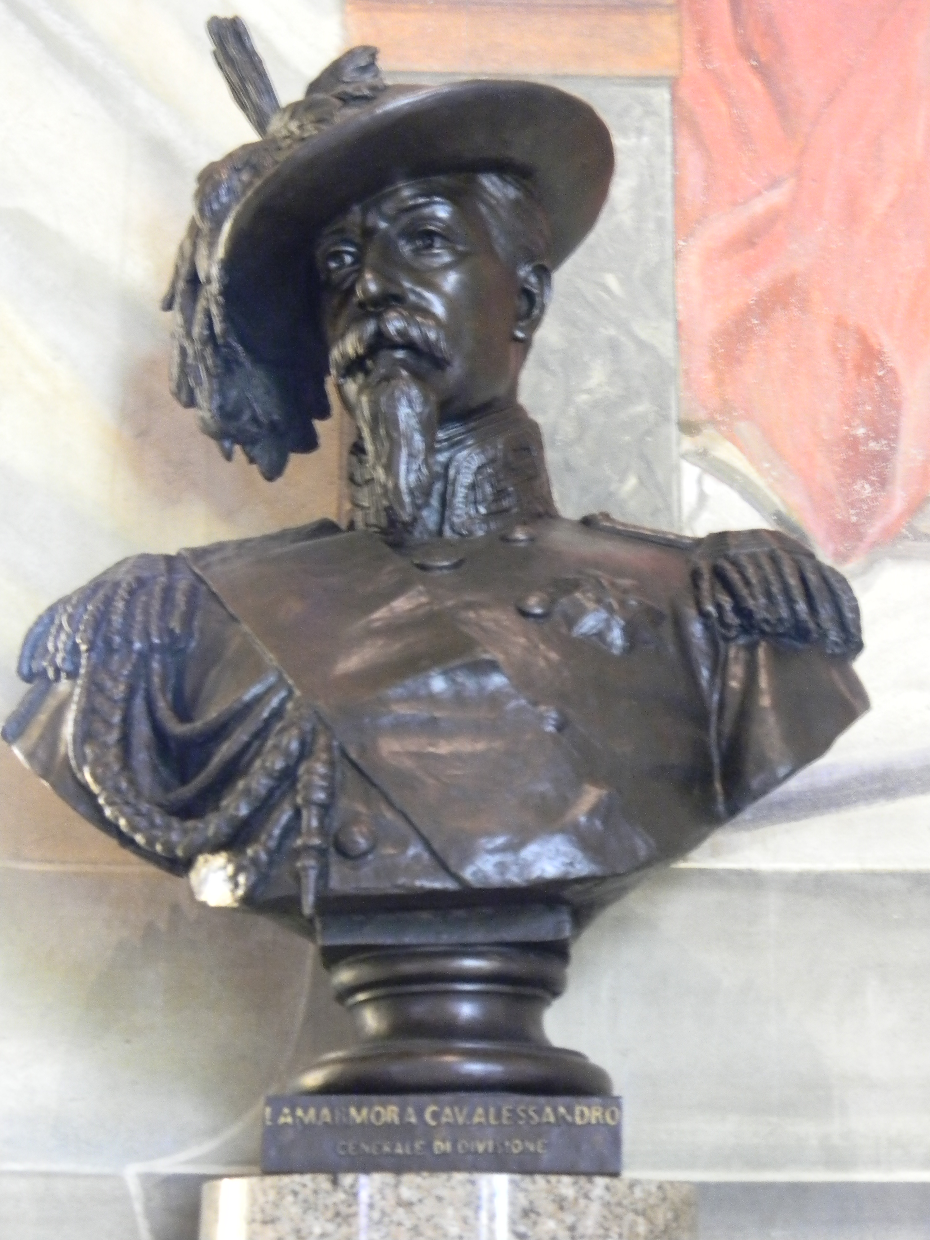 Buste de Alessandro La Marmora, depuis la tour de San Martino, Italie.